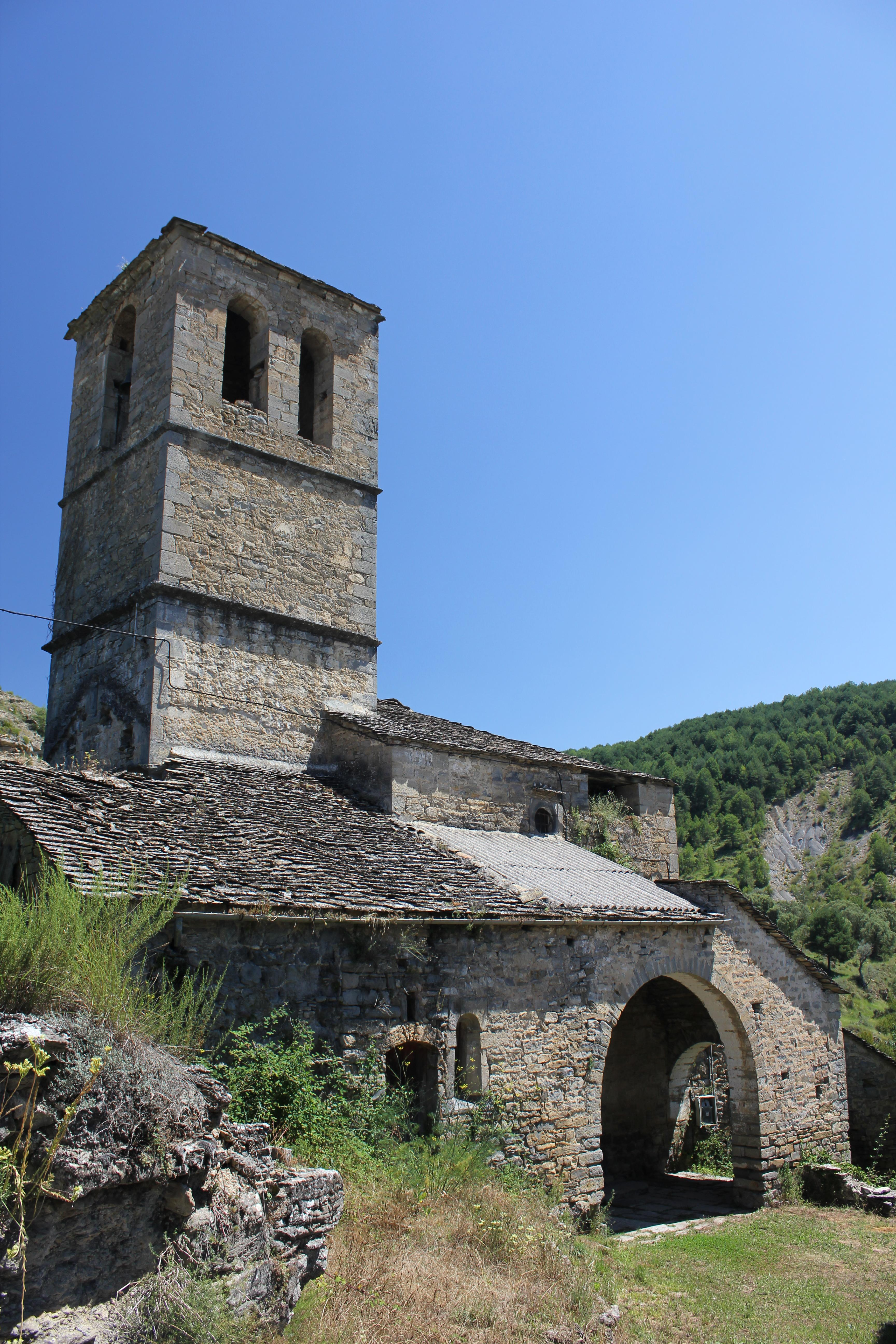 Aragonés: A ilesia parroquial de Formigals, en A Fueva.